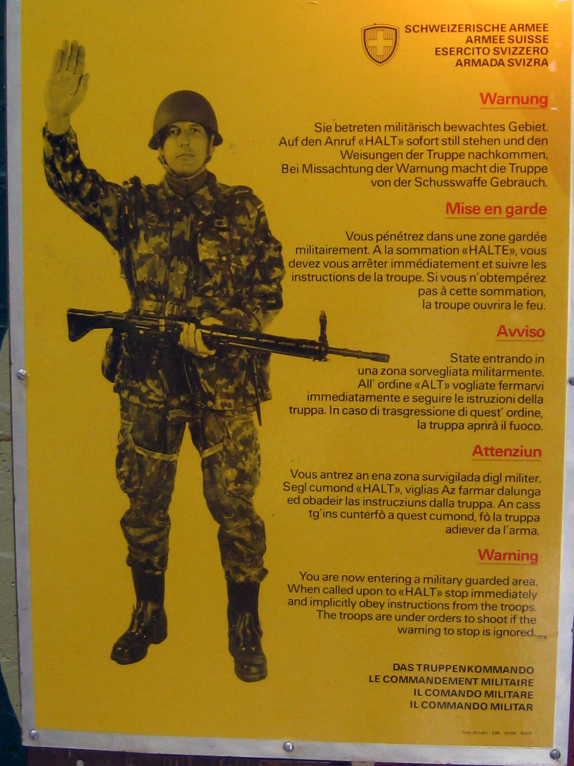 Wachtplakat der Schweizer Armee, fotografiert in der Festung Heldsberg, St. Margrethen, Kanton St. Gallen